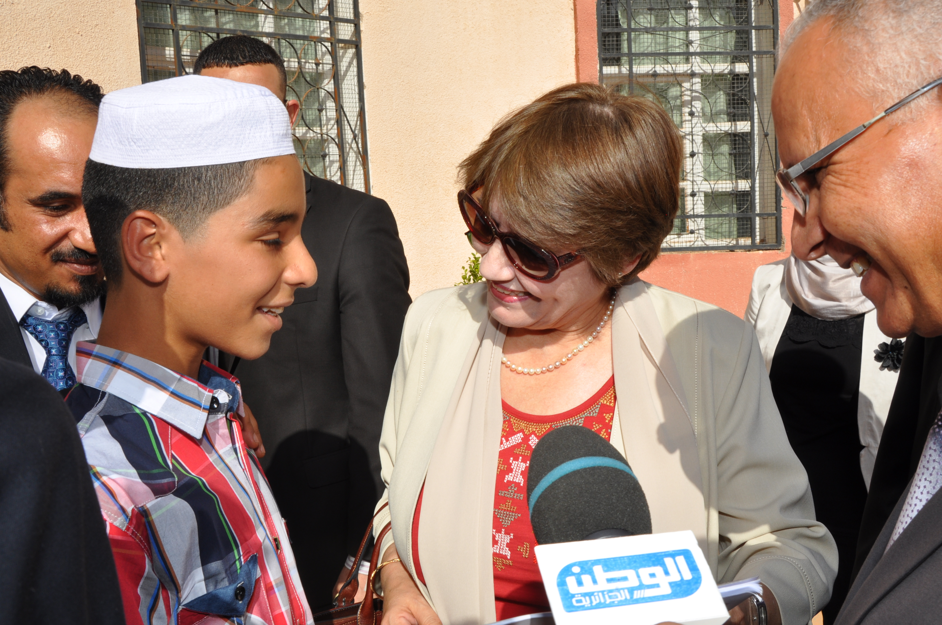 Launching of the school year 2014/2015 by the minister of National education from Ghardaia.